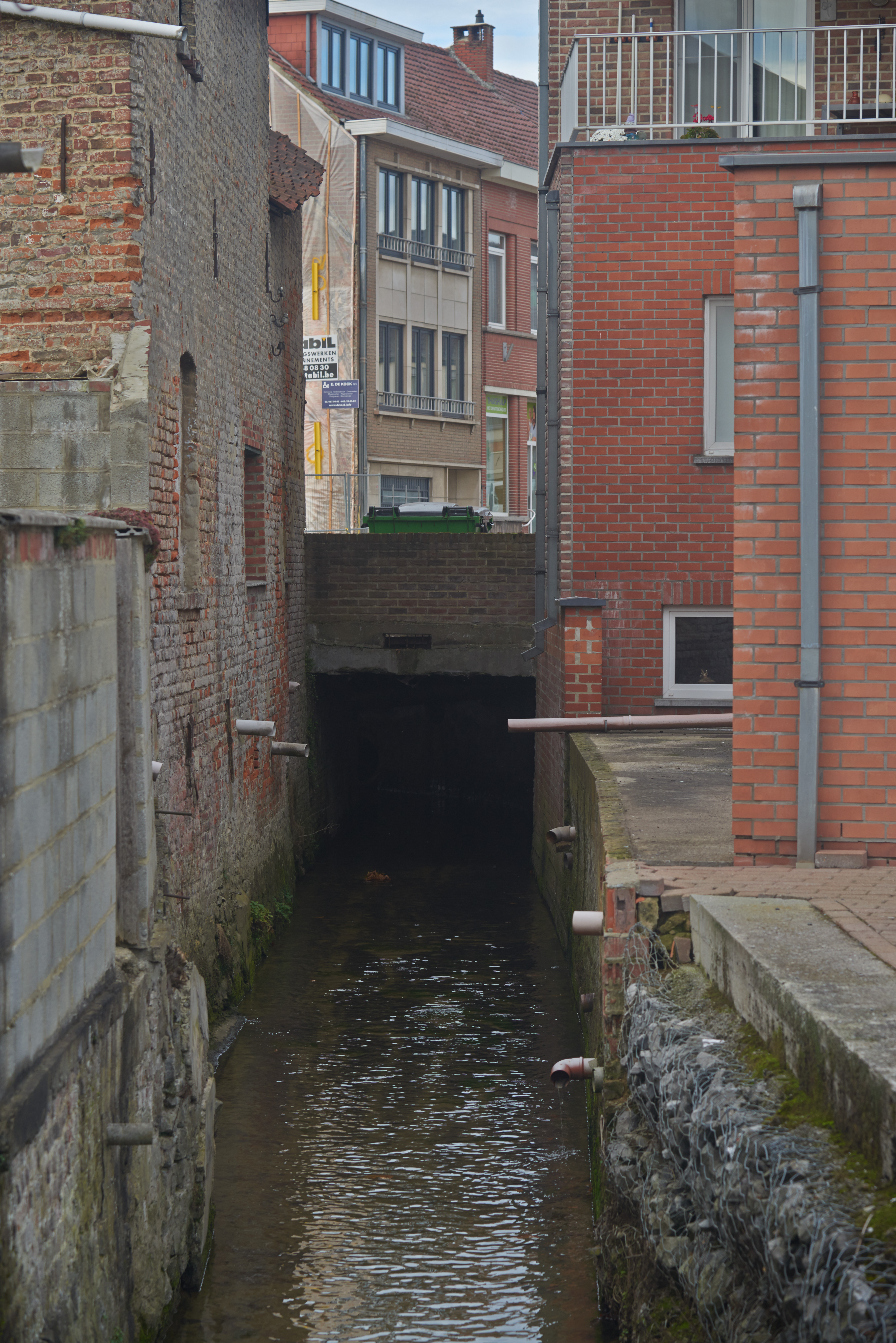 De IJse in Huldenberg, België. Zicht naar het Gemeenteplein.